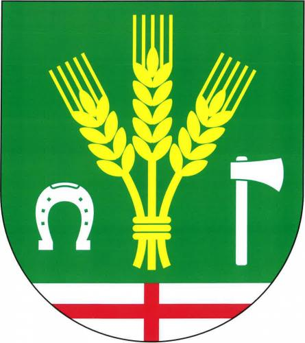 Kámen, okres Havlíčkův Brod, znak